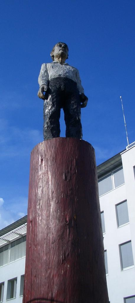 Große Säulenfigur von Stephan Balkenhol auf dem Senser-Platz in Lörrach